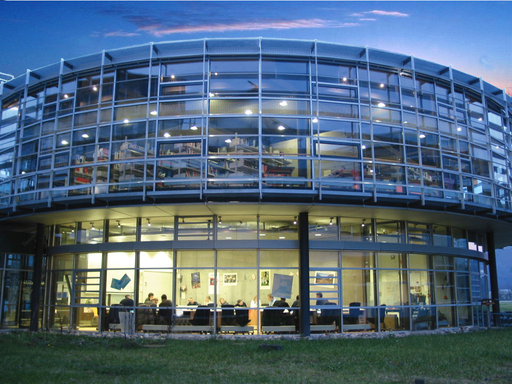 Bibliothek bei Nacht